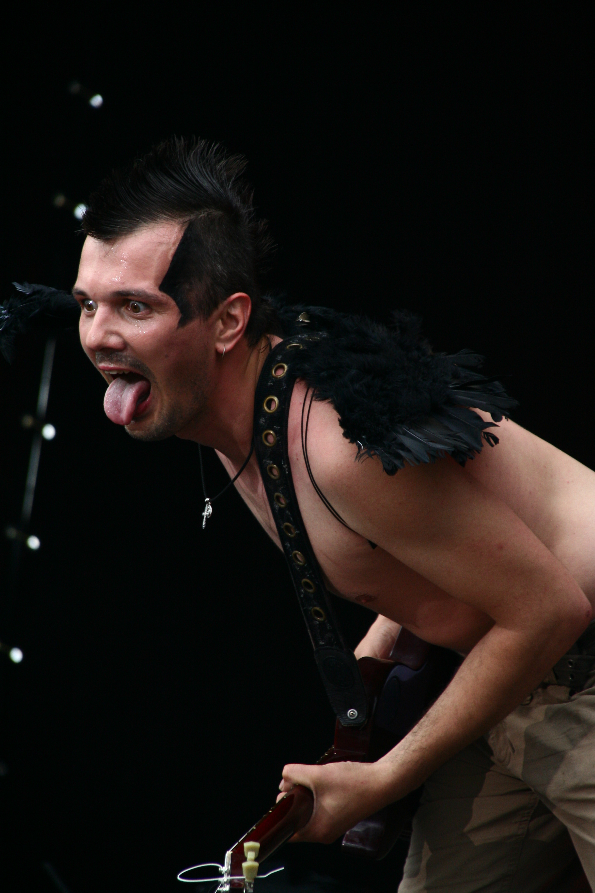 Григорий Зобенко, группа "Скворцы Степанова" на фестивале "Окна Открой 2009"